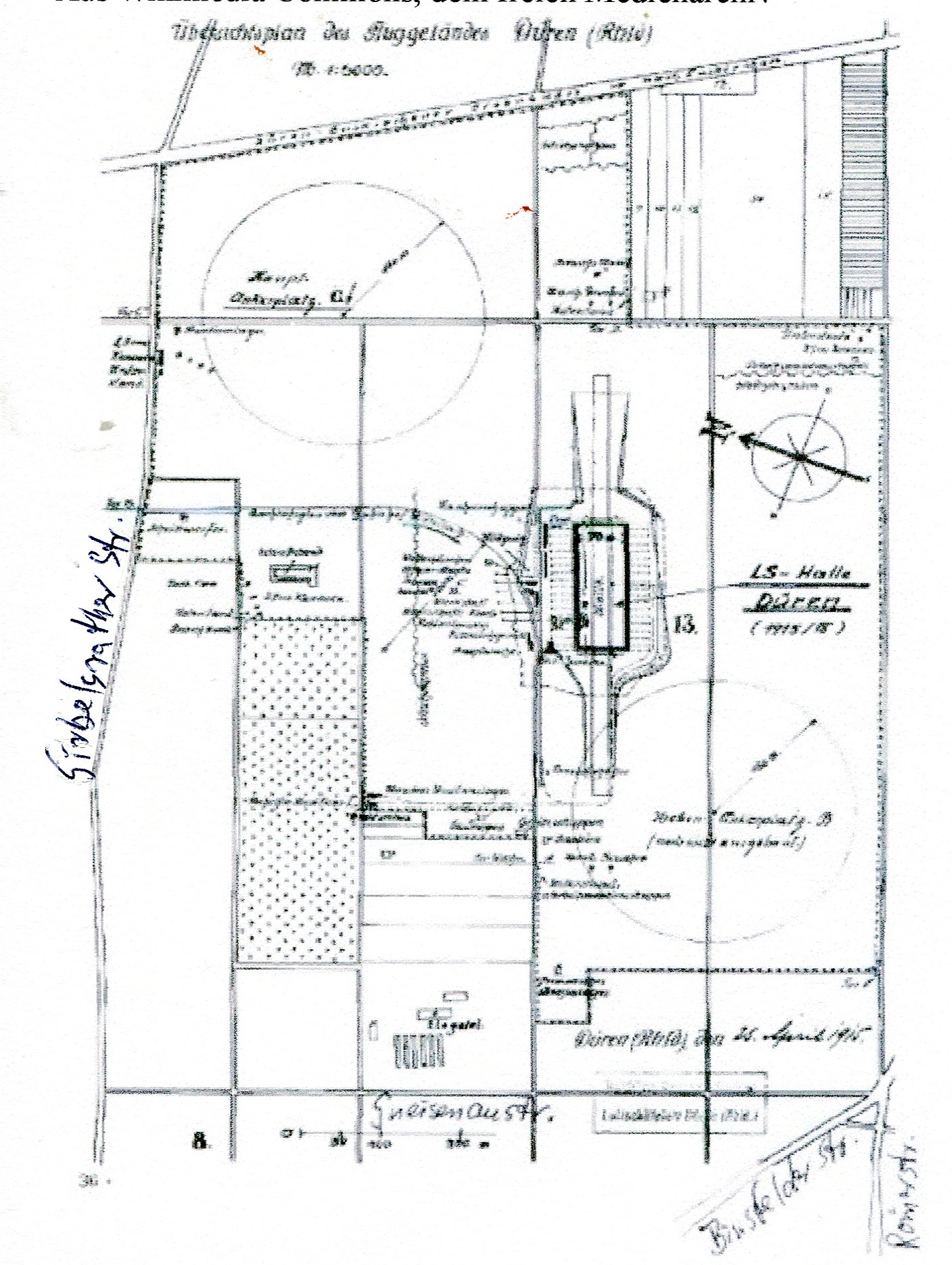 Lageplan des Luftschiffhafens in Düren